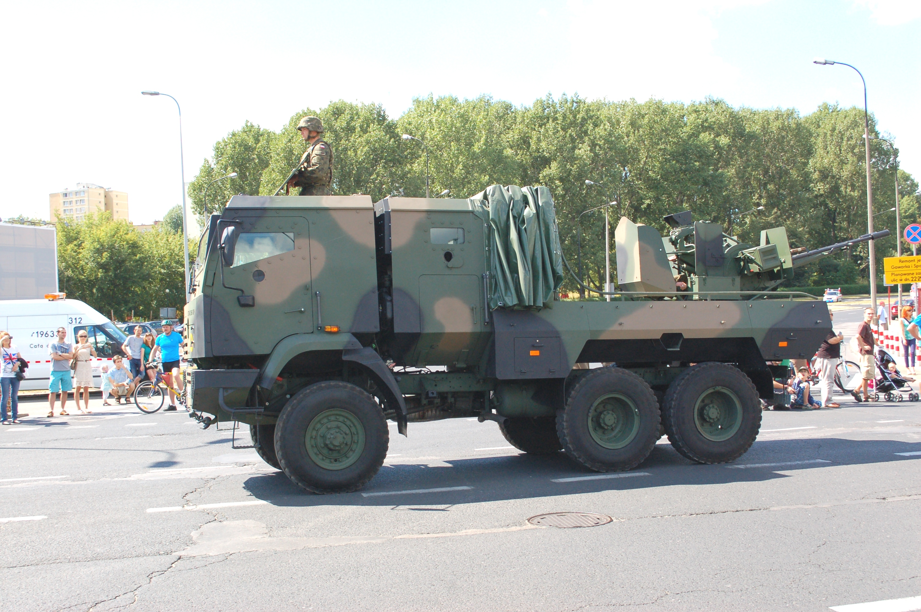 August 15, 2013 military parade in Warsaw